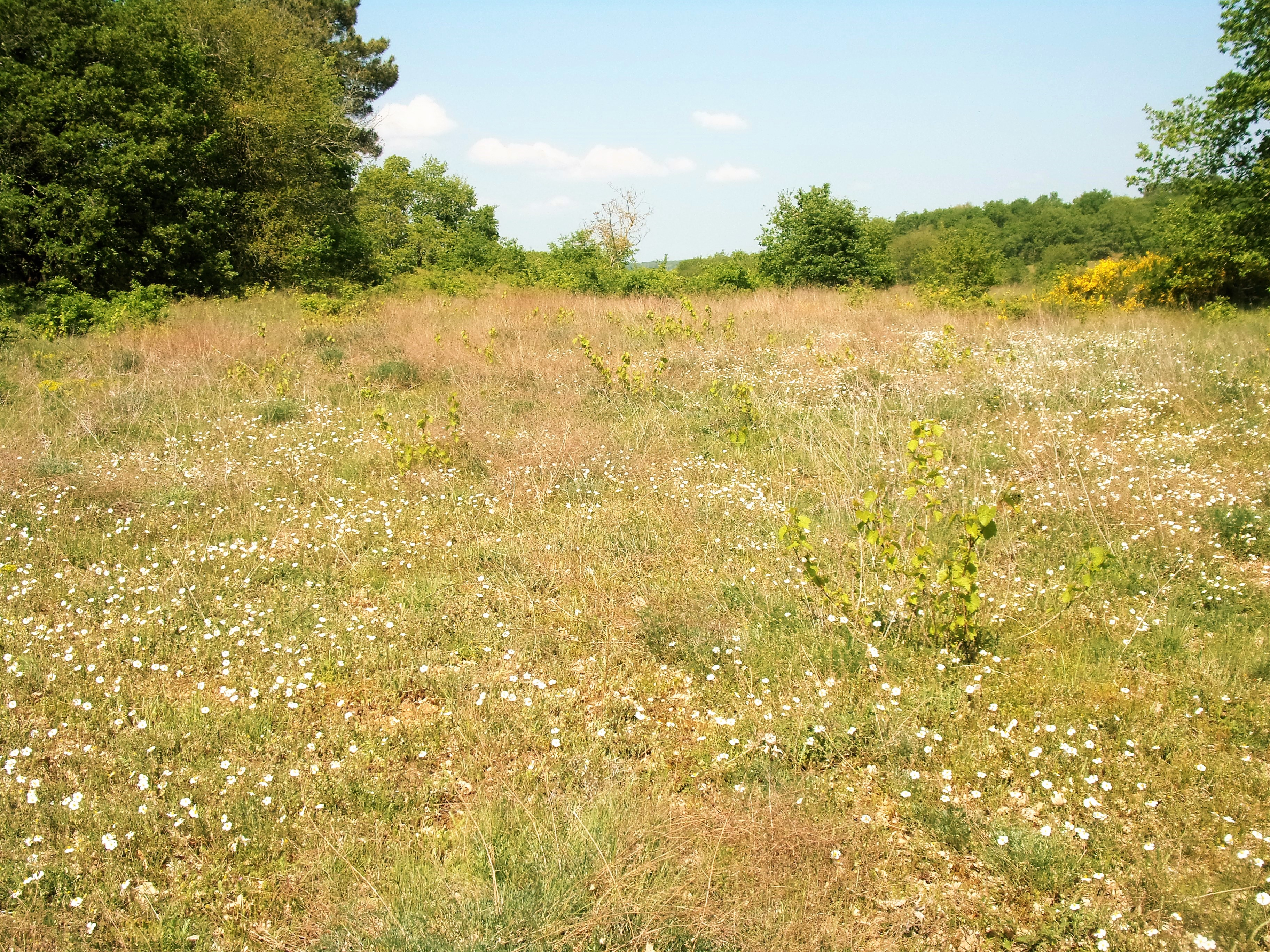 Pelouse sèche prenant la place d'une vigne abandonnée